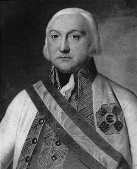 József Alvinczi (1735-1810), feldmarschall autrichien et commandant en chef l'armée autrichienne d'Italie.